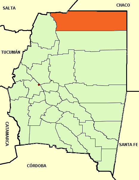 Mapa editado de: Santiago del Estero province (Argentina), departments and capital.png